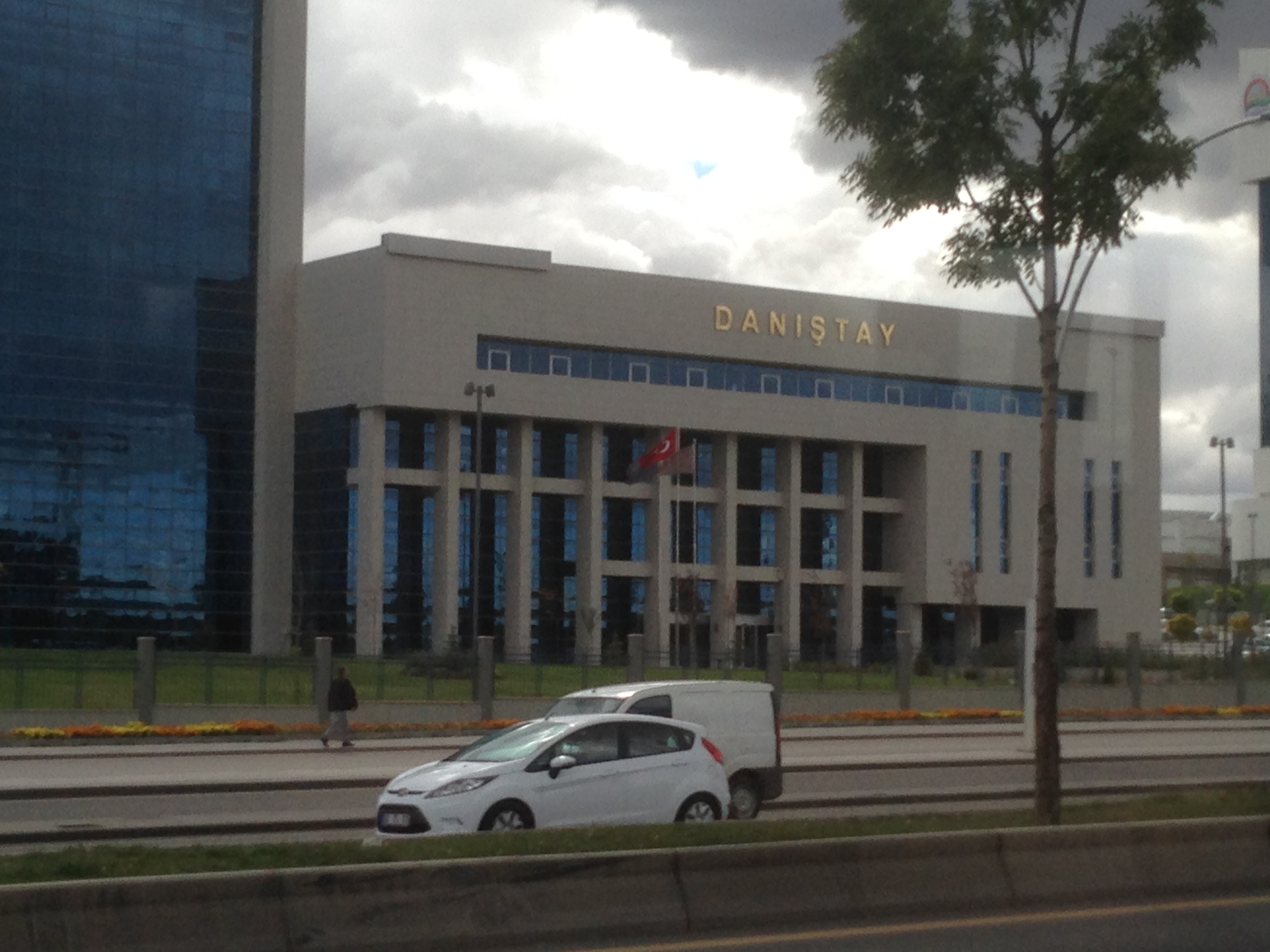 Türkiye Danıştay Başkanlığı Binası, Ankara